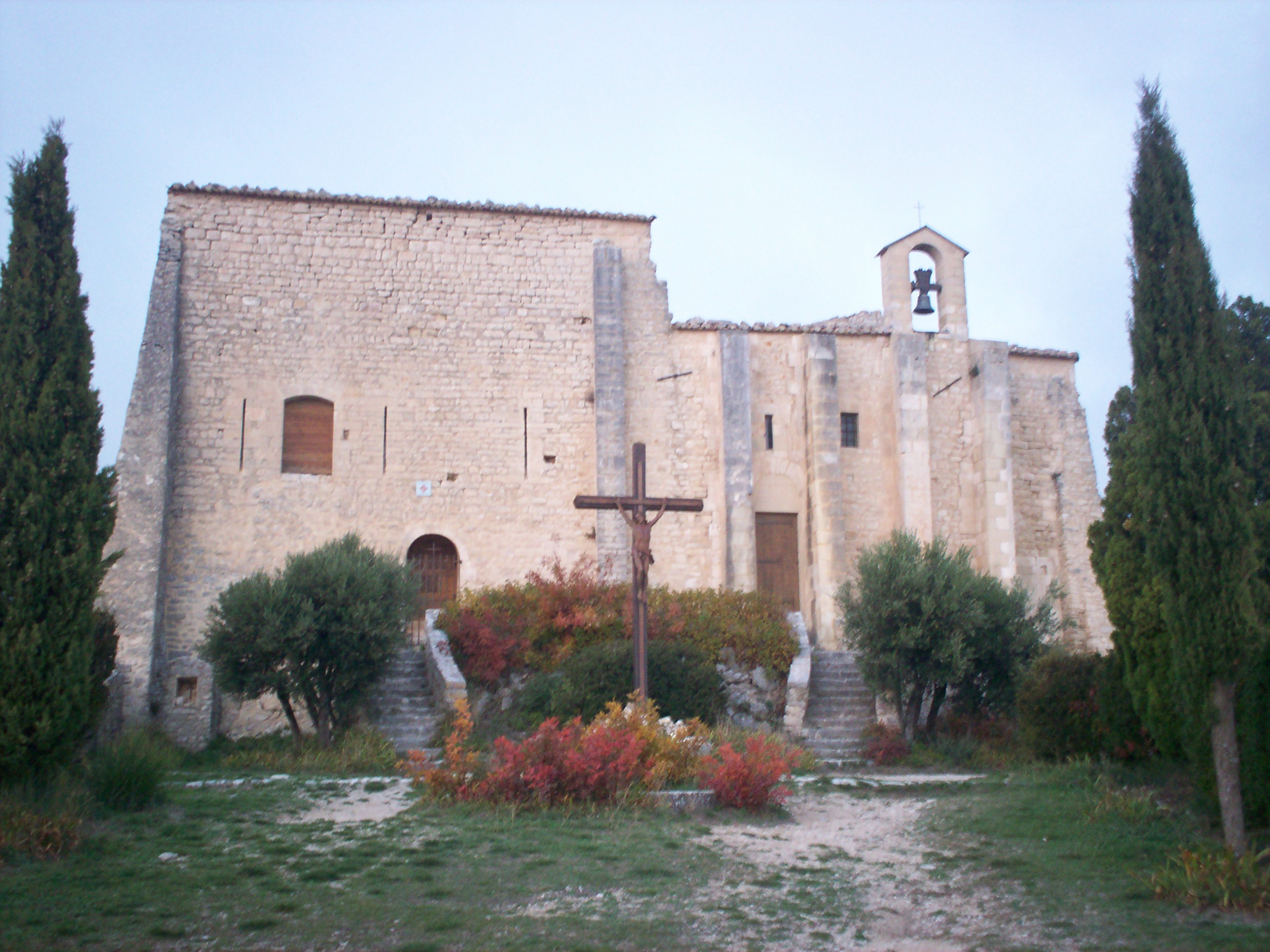 Ruine de l'église dominant le village de Saint Saturnin lès Apt, Vaucluse, France